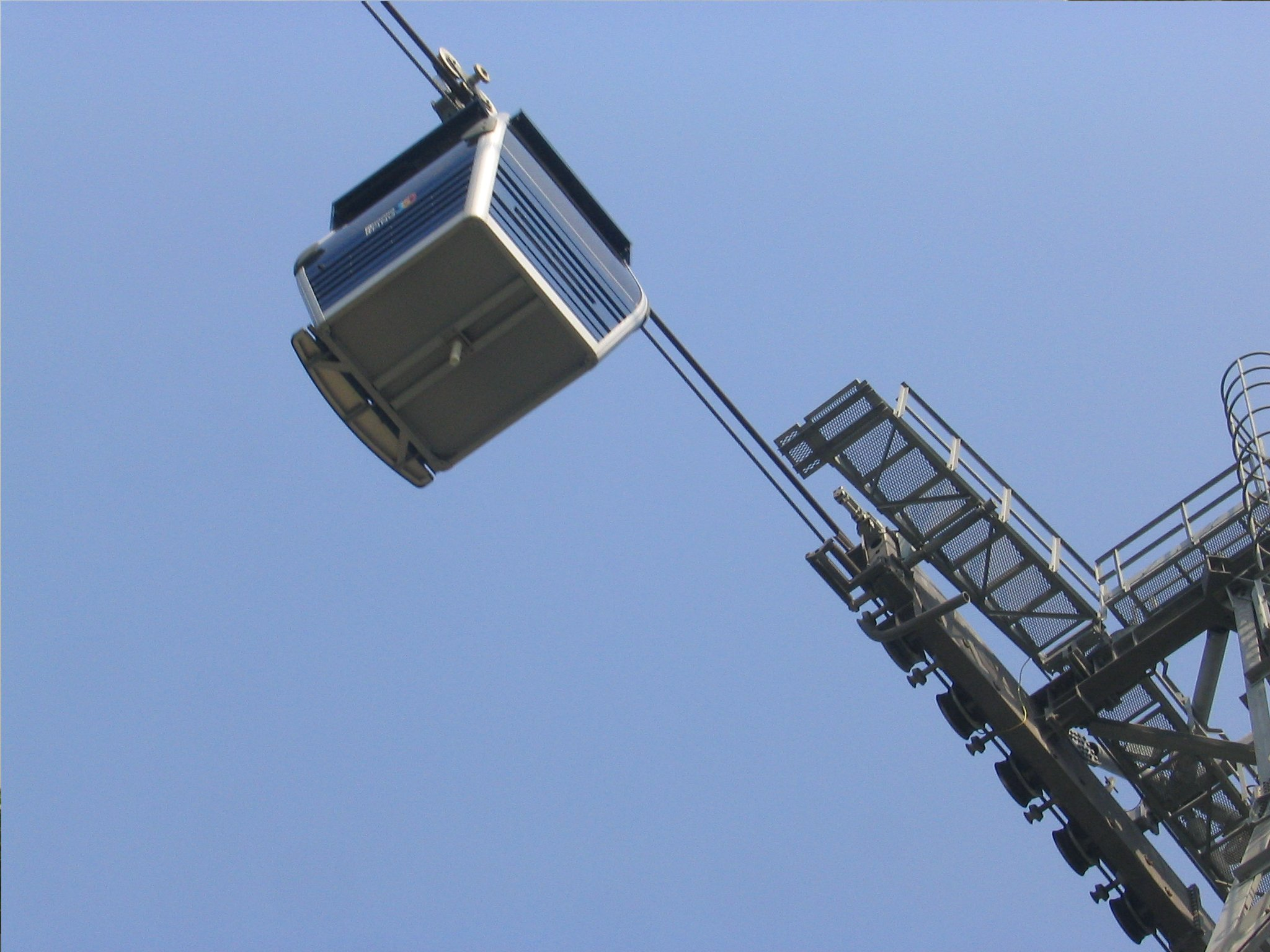 昂坪360-近東涌纜車站(T1塔) Ngong Ping 360 near Tung Chung Skyrail Terminal (T1)